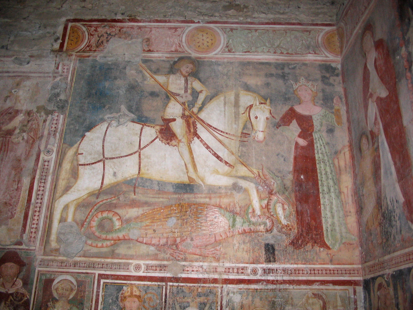 San Giorgio e la principessa; affresco attribuito al cosiddetto "Maestro del 1388" e datato alla fine degli anni '80 del XIV secolo. Chiesa di San Giorgio in Lemine (ad Almenno San Salvatore, Bergamo). Fotografia di Giorces.